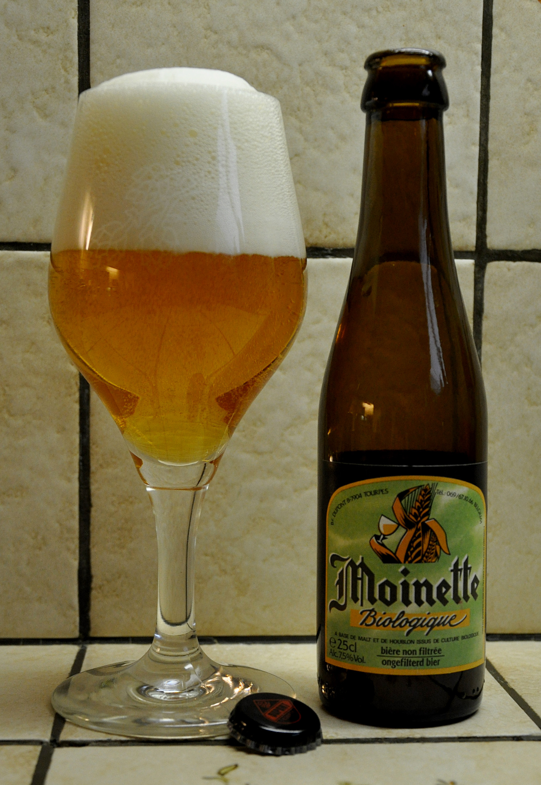 Moinette Biologique